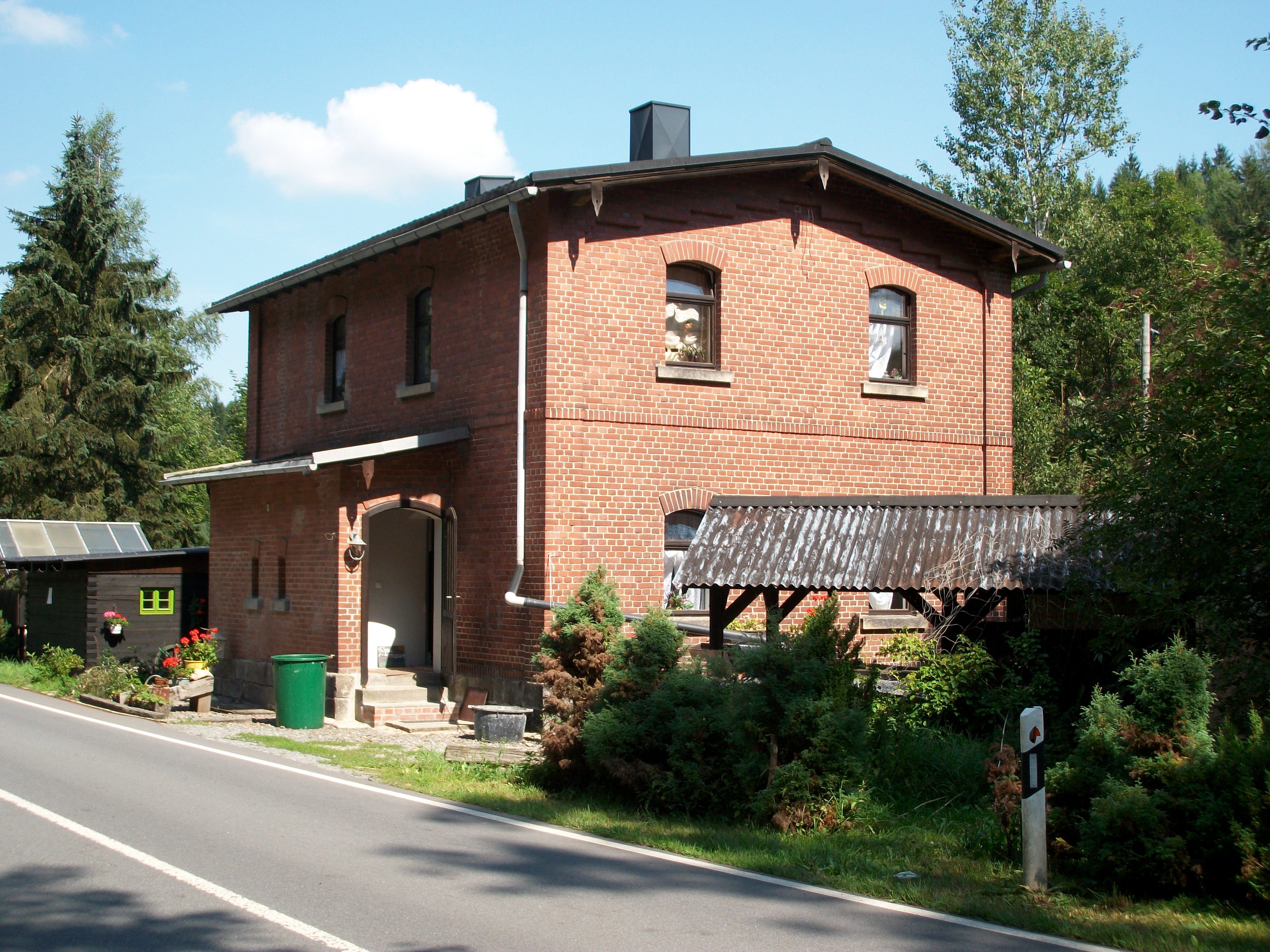 ehemaliger Bahnhof Wolfsgrün